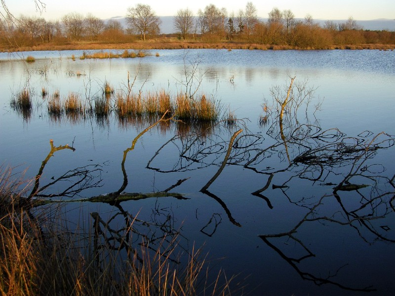 Das Hohe Moor bei Stade: Oldendorfer See